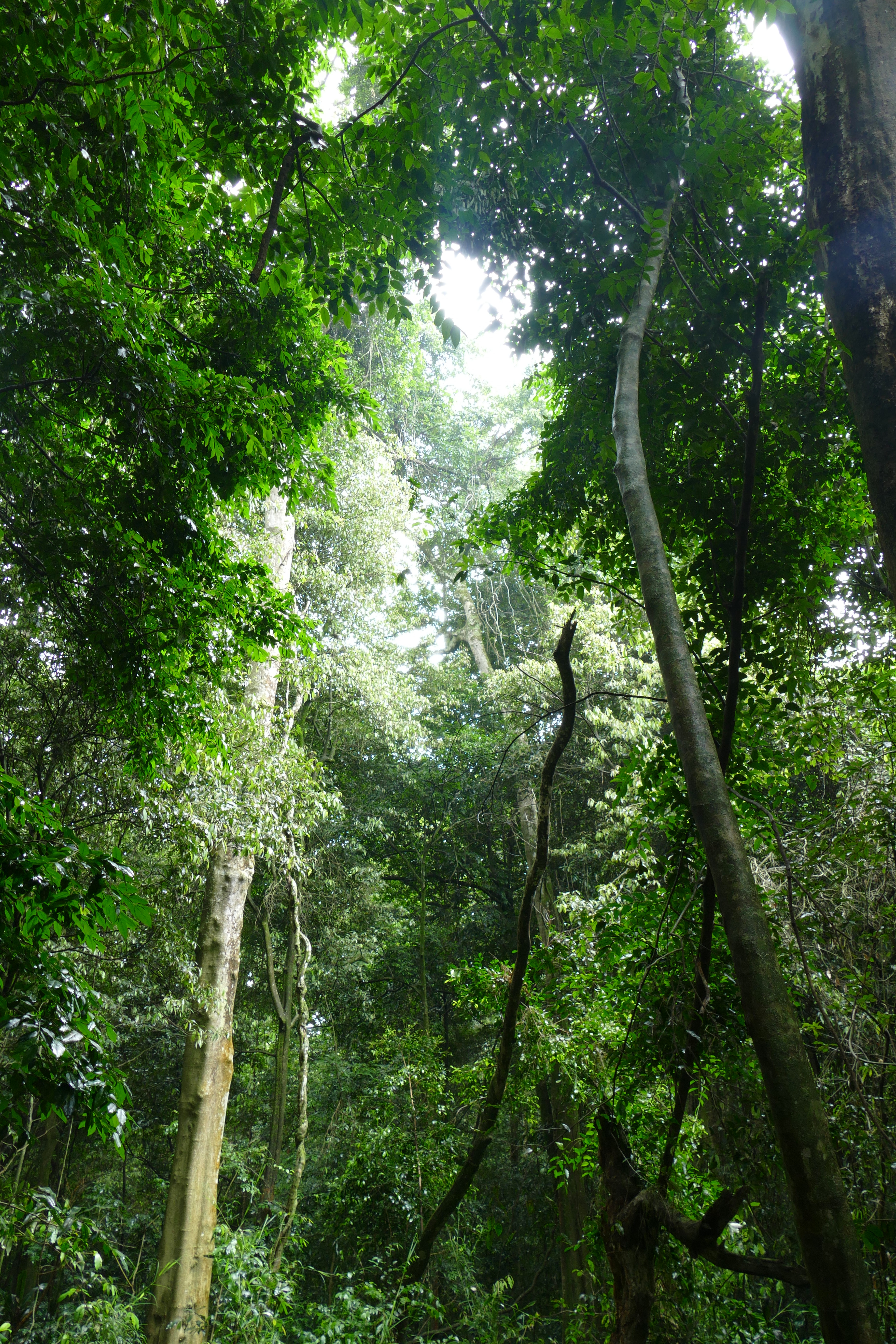 Dlinza Forest, Eshowe, KwaZulu-Natal, SOUTH AFRICA